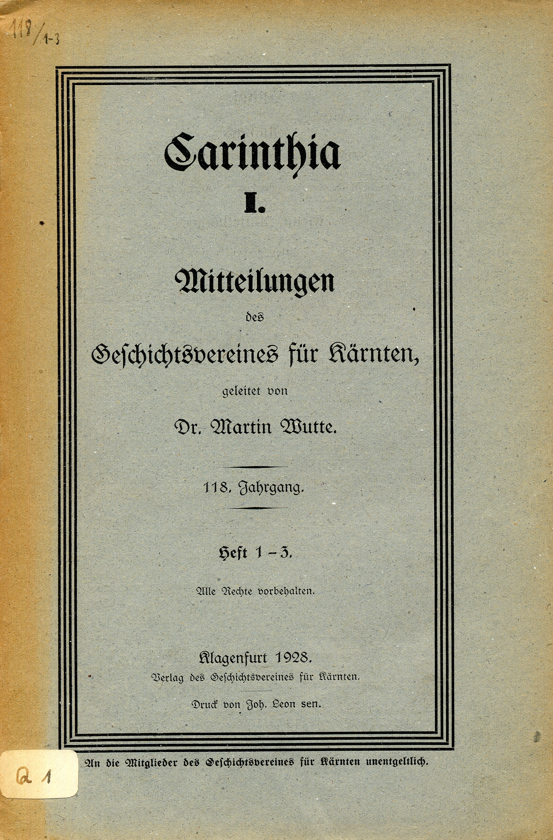 Zeitschrift "Carinthia I. Mitteilungen des Geschichtsvereins für Kärnten geleitet von Dr. Martin Wutte. 118. Jahrgang. Heft 4-6. Klagenfurt 1928. Der Jahrgang der Carinthia I von 1928 bestand aus 2 Doppelnummern mit insgesamt 144 Seiten. Format 15,2 cm x 23,2 cm. Höhe aller Hefte des Jahrgangs 0,8 cm. Exemplar aus dem Bestand von Univ. Prof. Dr. Eb. Kranzmayer. München 13, Georgenstr. 101.